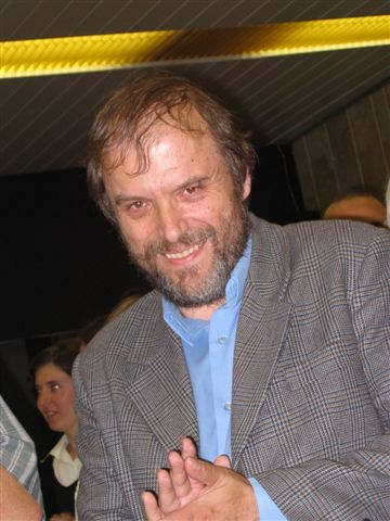 Mikołaj Szymański (b. 1954), Polish classic philologist